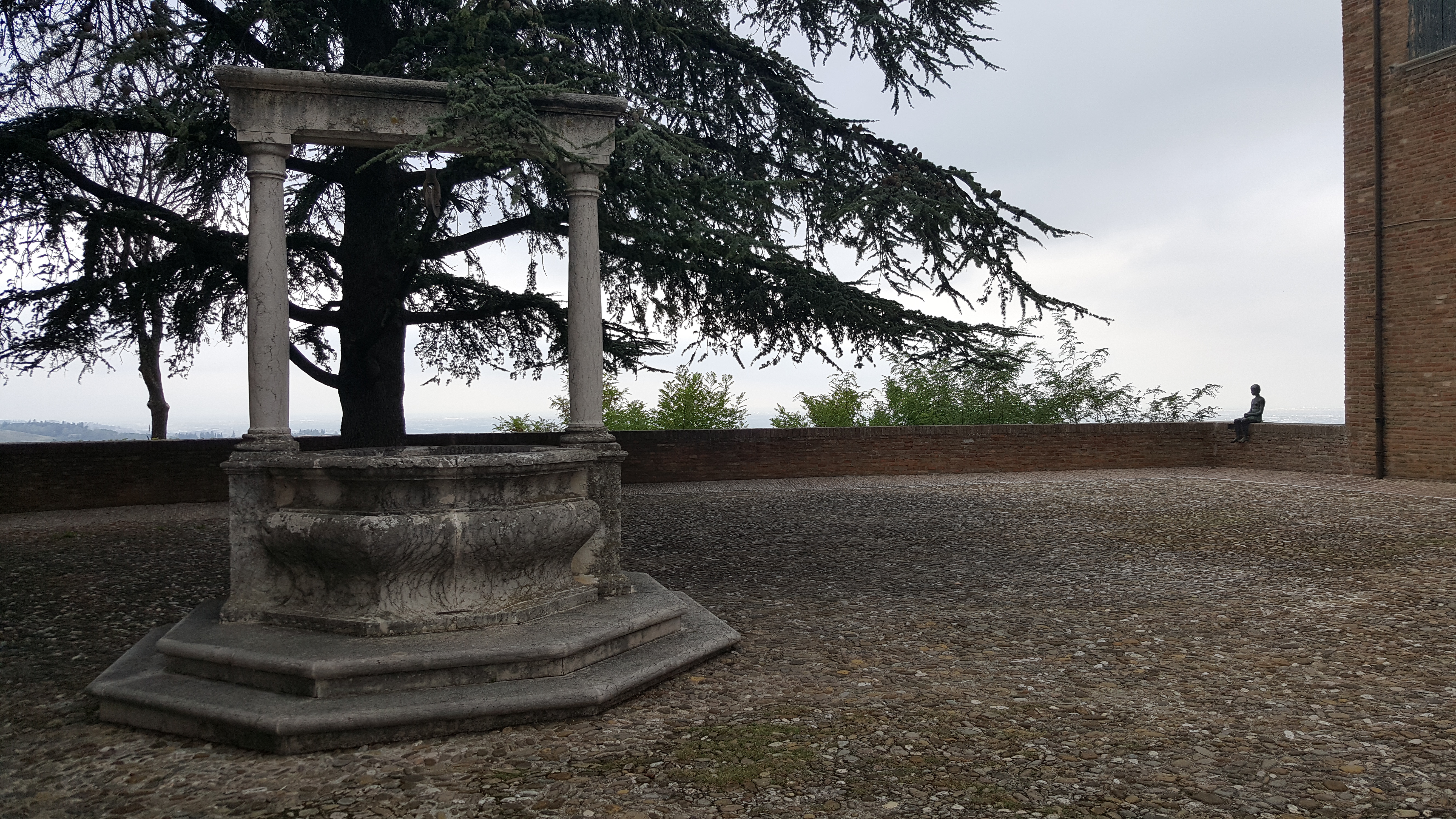 Castello This is a photo of a monument which is part of cultural heritage of Italy.